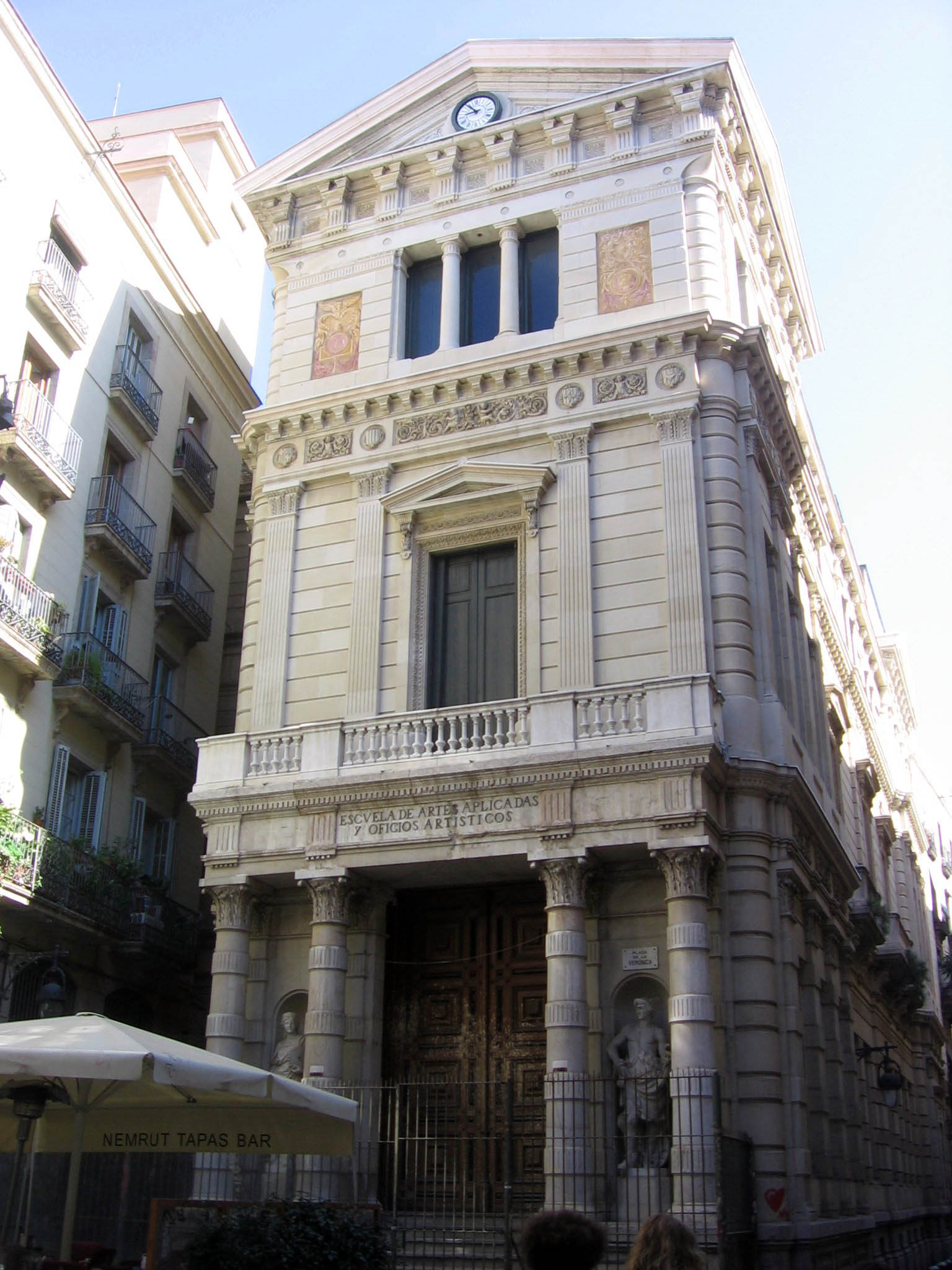 Bolsín, Tiberi Sabater.